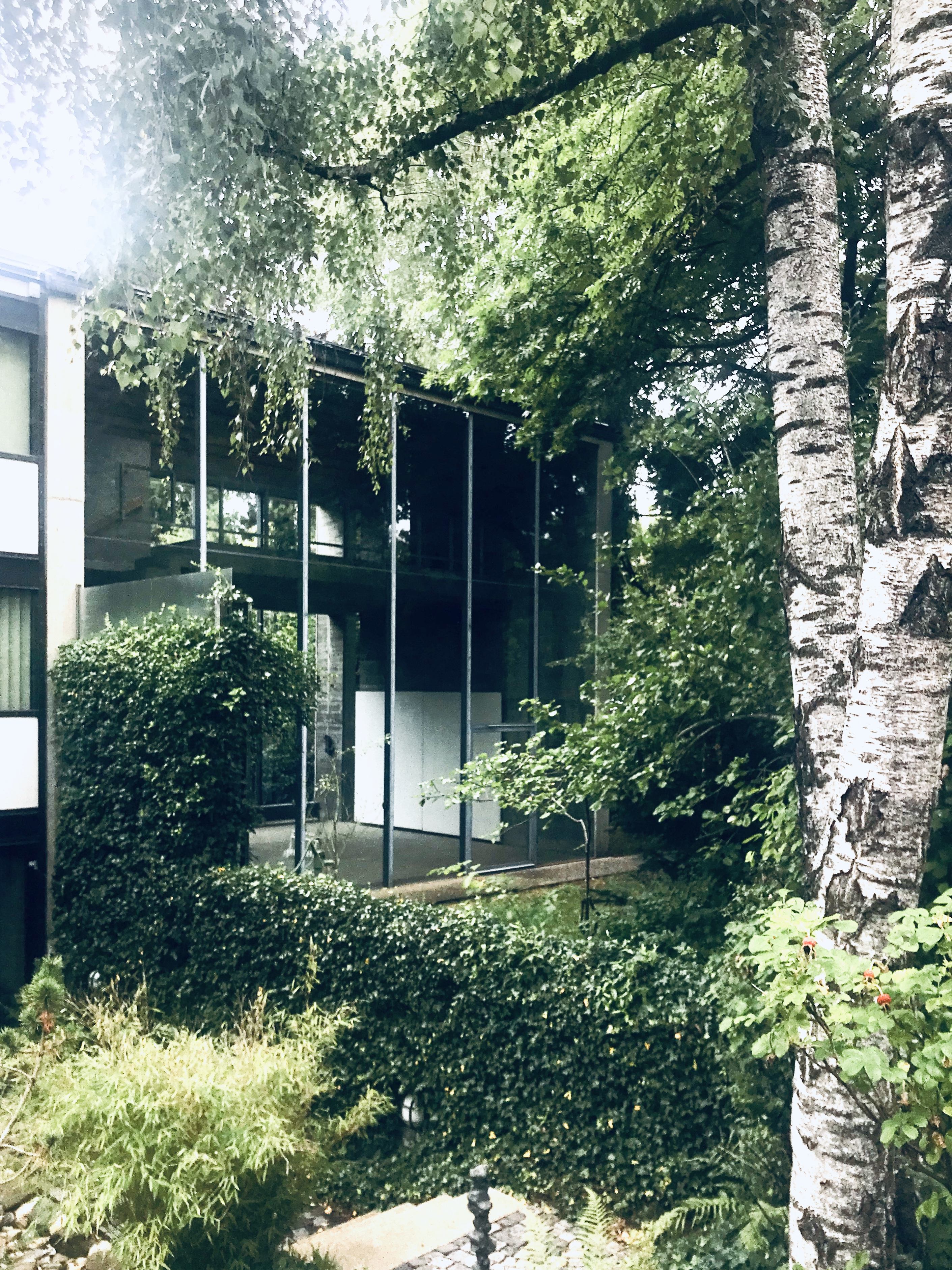 Schwabing